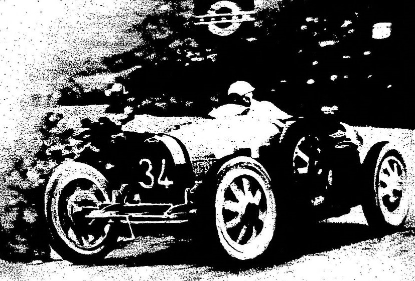 Elizabeth Junek à la Targa Florio 1926.